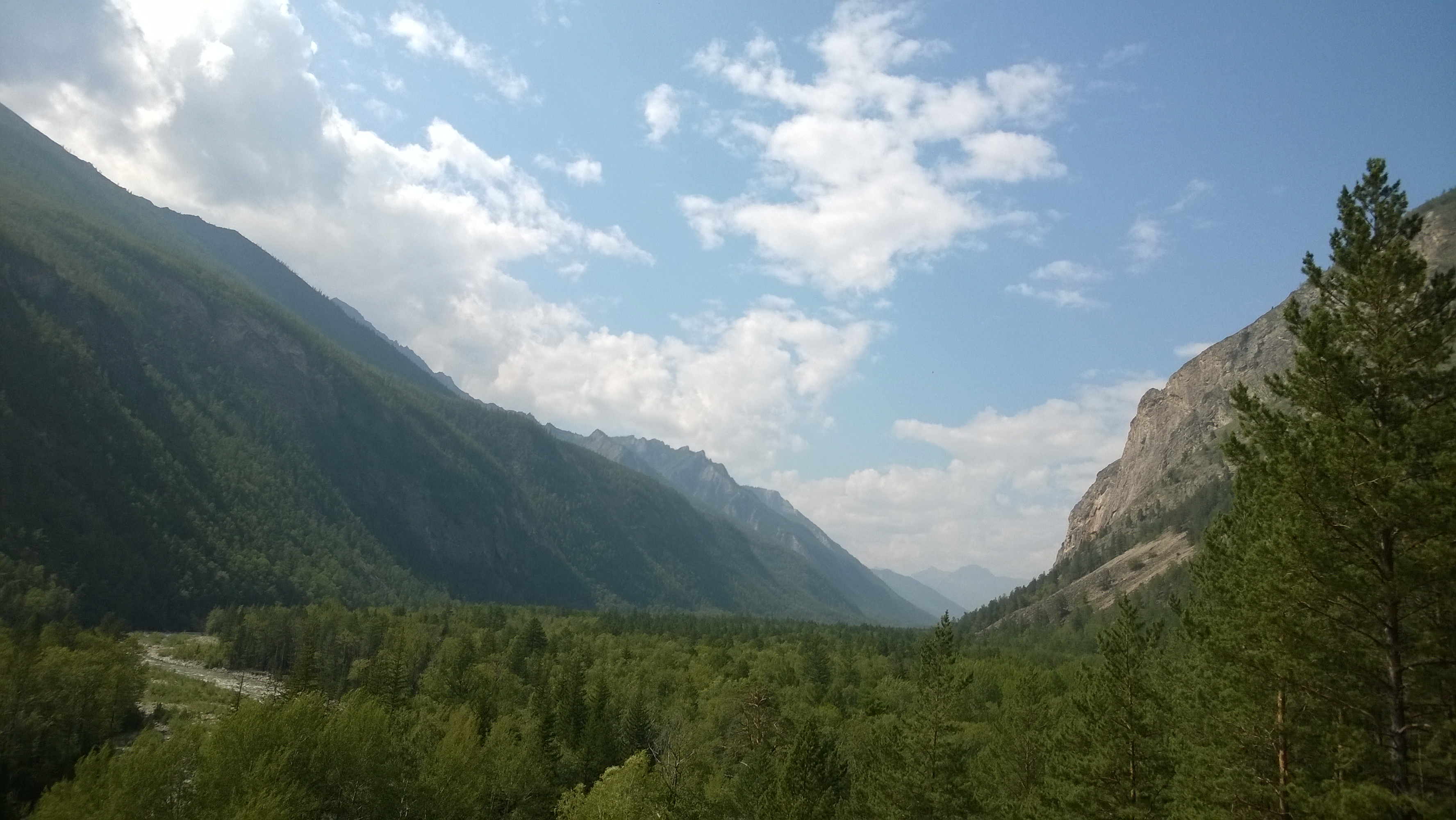 Курорт Алла: Алла,Курумканский район, Бурятия This image is related to the protected area of Russia number 0330053